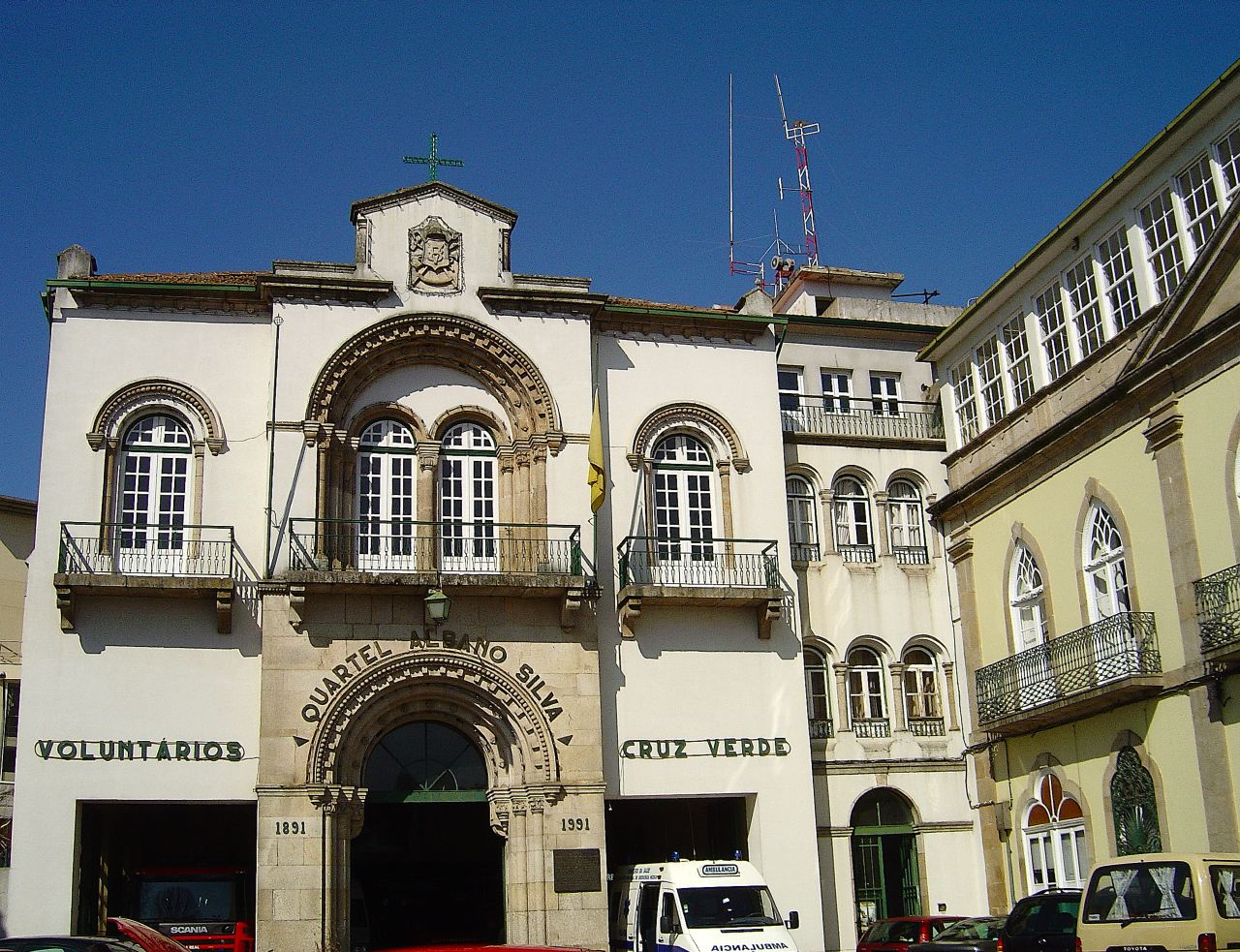 Vila Real - Portugal